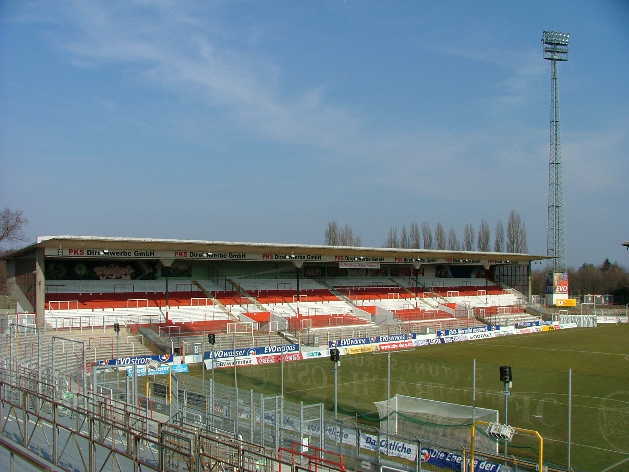 Stadion am Bieberer Berg, Offenbach am Main, Germany